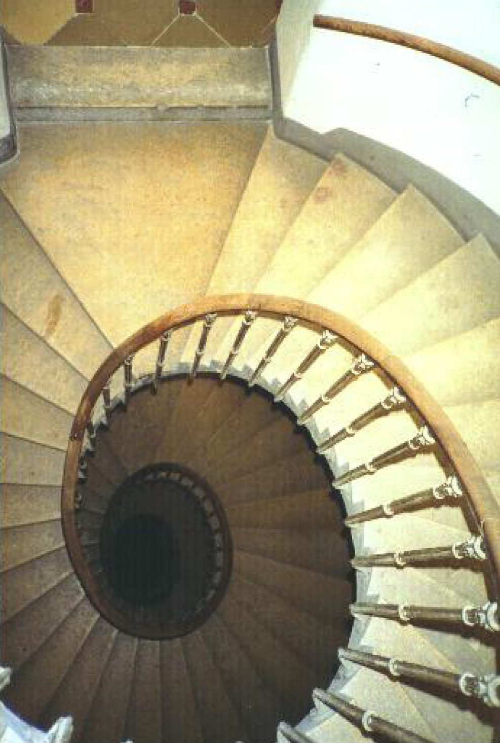 Das "Gotische Haus" Wohn- und Geschäftshaus Pollak, Franz Josefs-Kai 37, Wendeltreppe